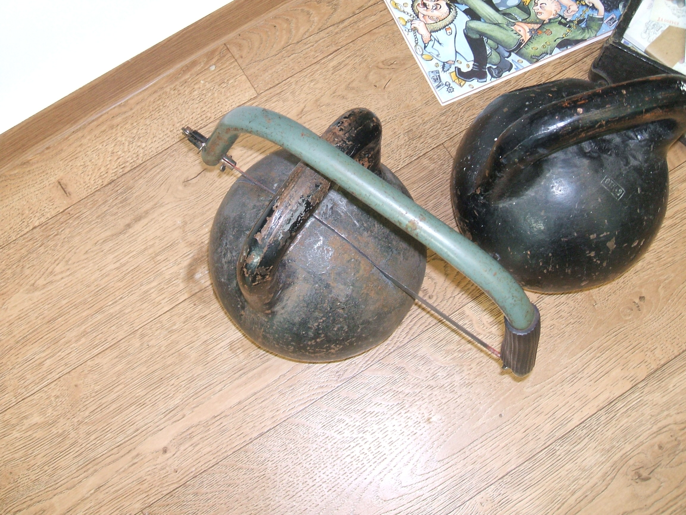 Экспонаты Народного музея Остапа Бендера, г. Сестрорецк